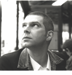 Foto: David K. Smith (zelf gemaakt)